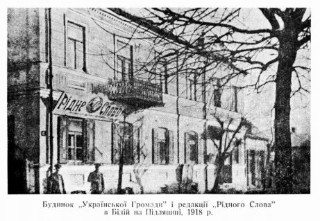 Dom Społeczności Ukraińskiej w Białej Podlaskiej (1918)